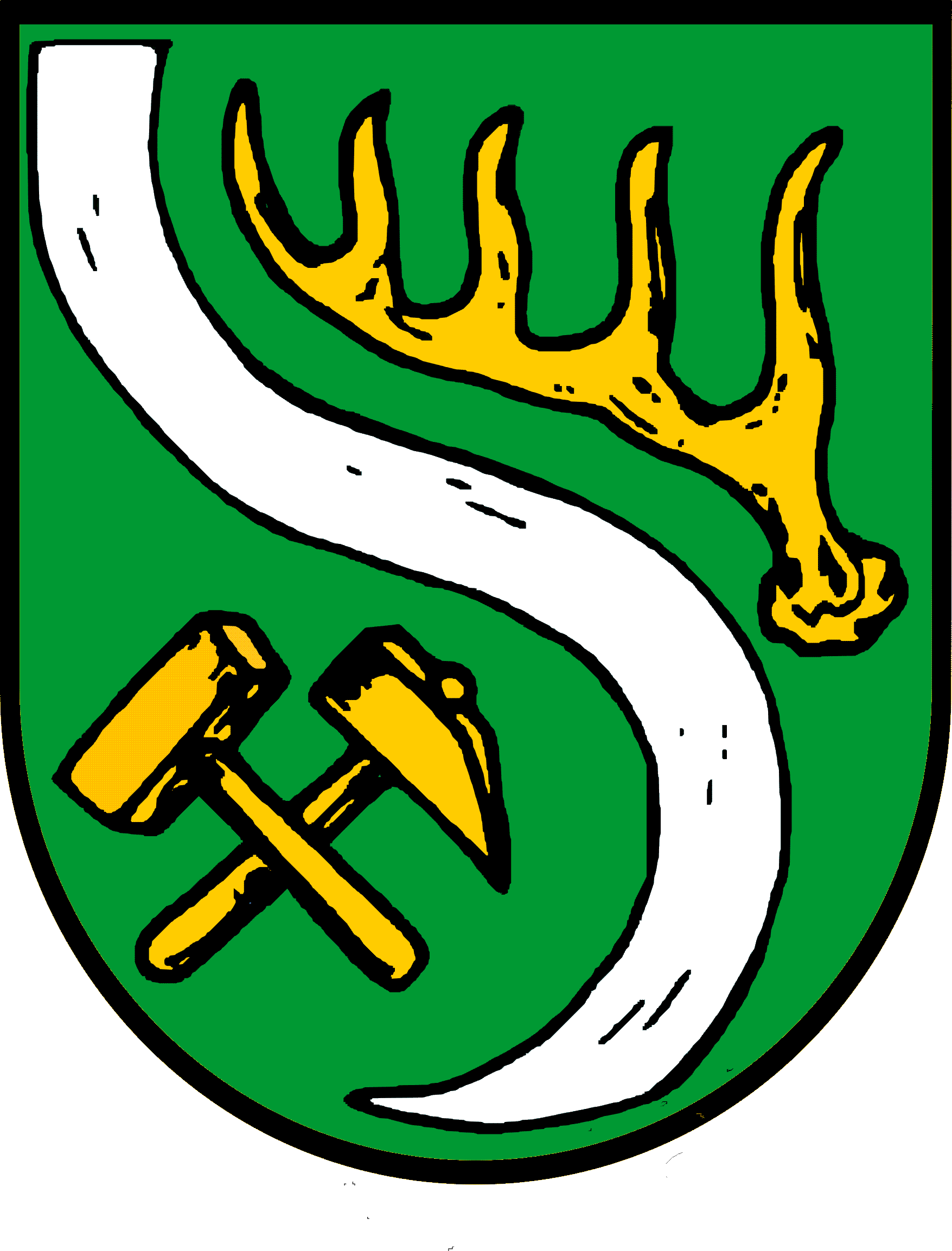 Wappen der Gemeinde Sieber